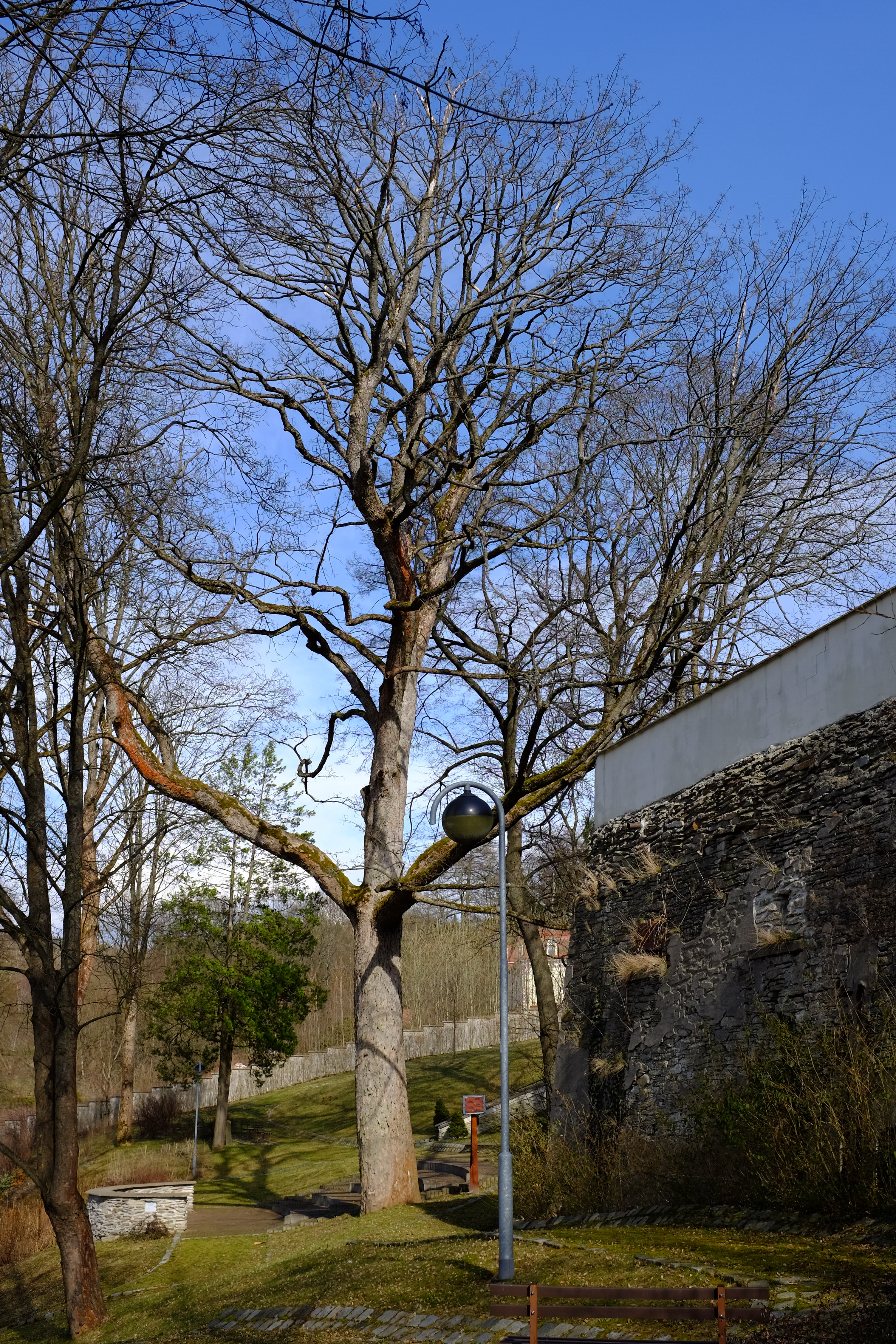 Památný strom - Zedwitzův javor, Aš